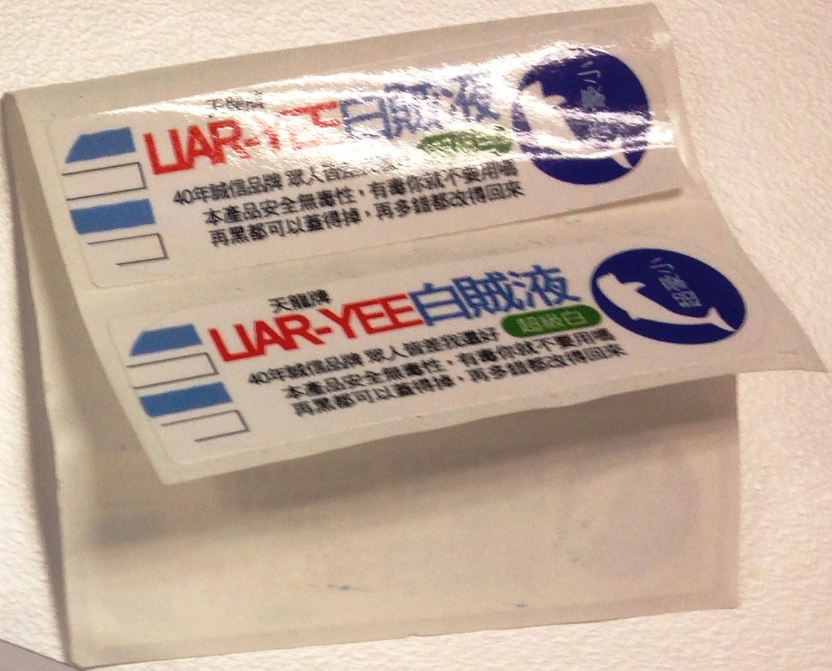 天龍牌超豪洨白賊液貼紙，譏諷2010年7月7日行政院院長吳敦義說「中華白海豚在台中港那段都會避過，何以在彰化就不能轉彎」。但2018年11月23日，搶救大潭藻礁行動聯盟義務律師陳憲政諷刺民主進步黨，「歷史不斷重演：以前你們笑『白海豚會轉彎』，現在你們講『小燕鷗會找別的地方育雛』」。